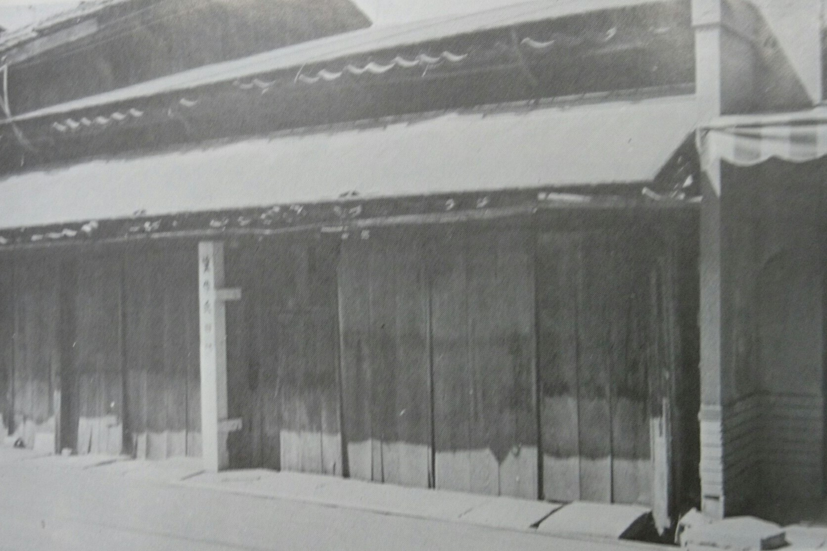 津山市の史跡「箕作阮甫旧宅」の解体復原工事前